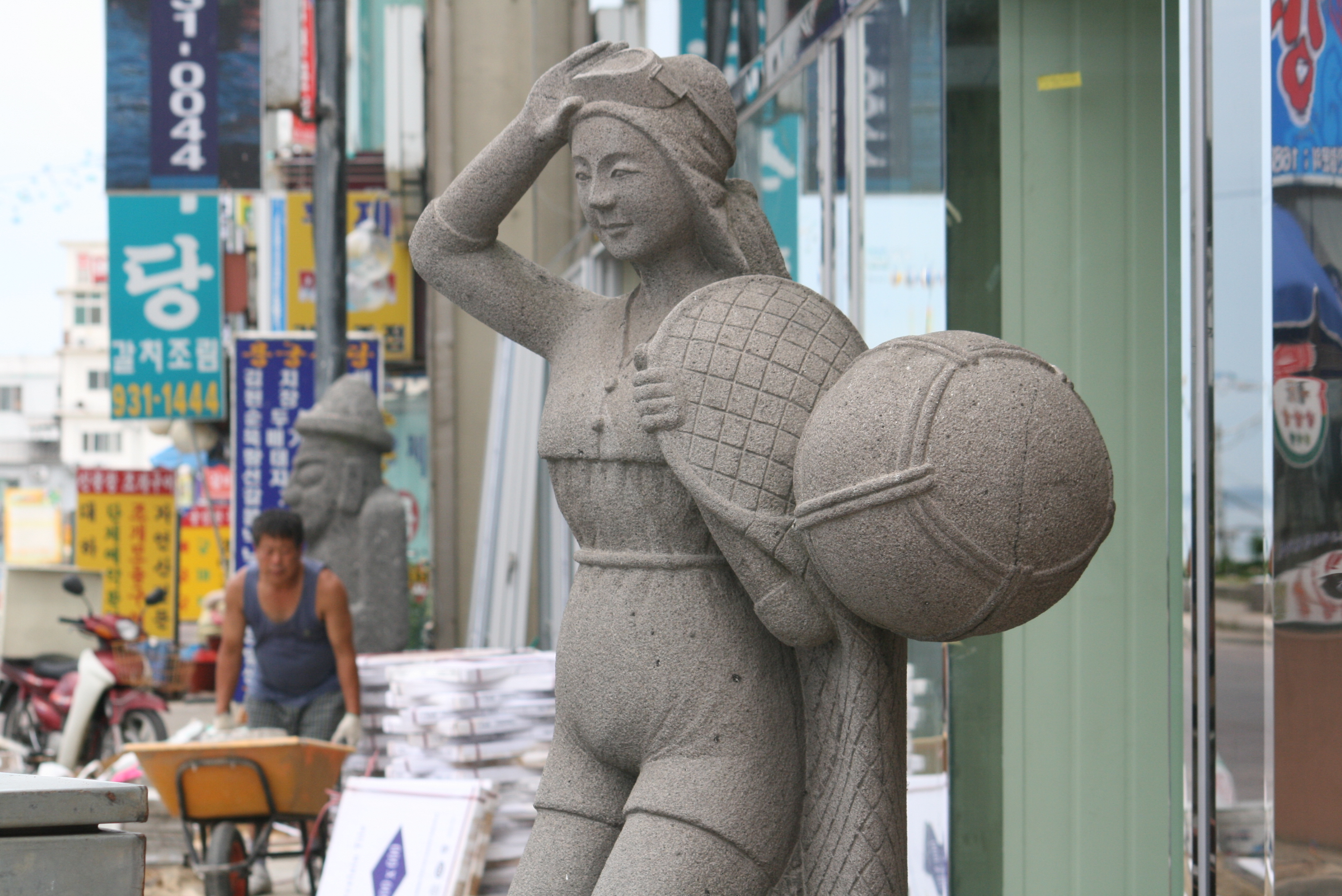 Haenyeo, Diving Woman.jpg